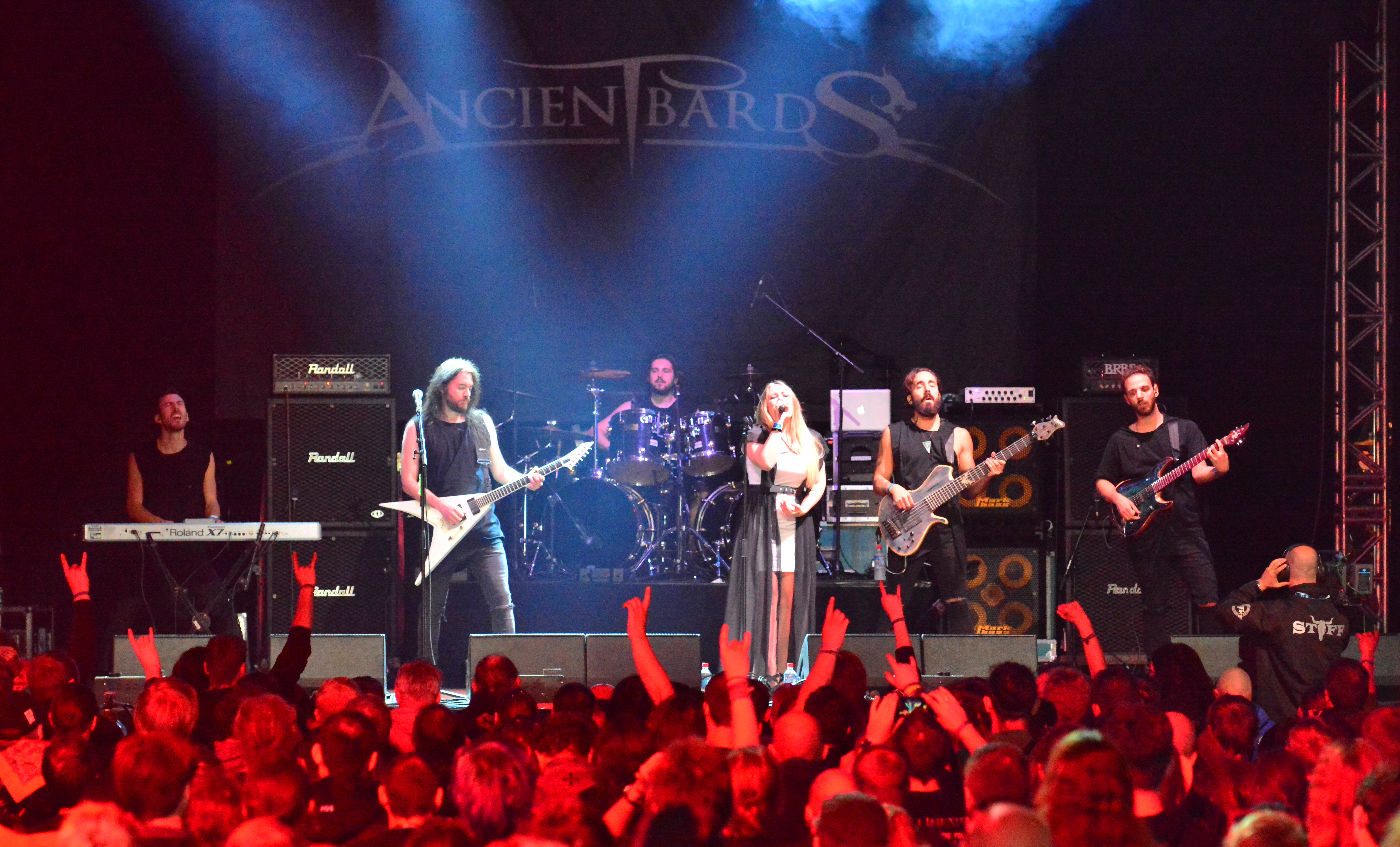 Ancient Bards beim Wacken Open Air 2015